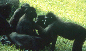 Macaca nigra. Réconciliation. Photographie de Bernard Thierry avec son aimable autorisation.